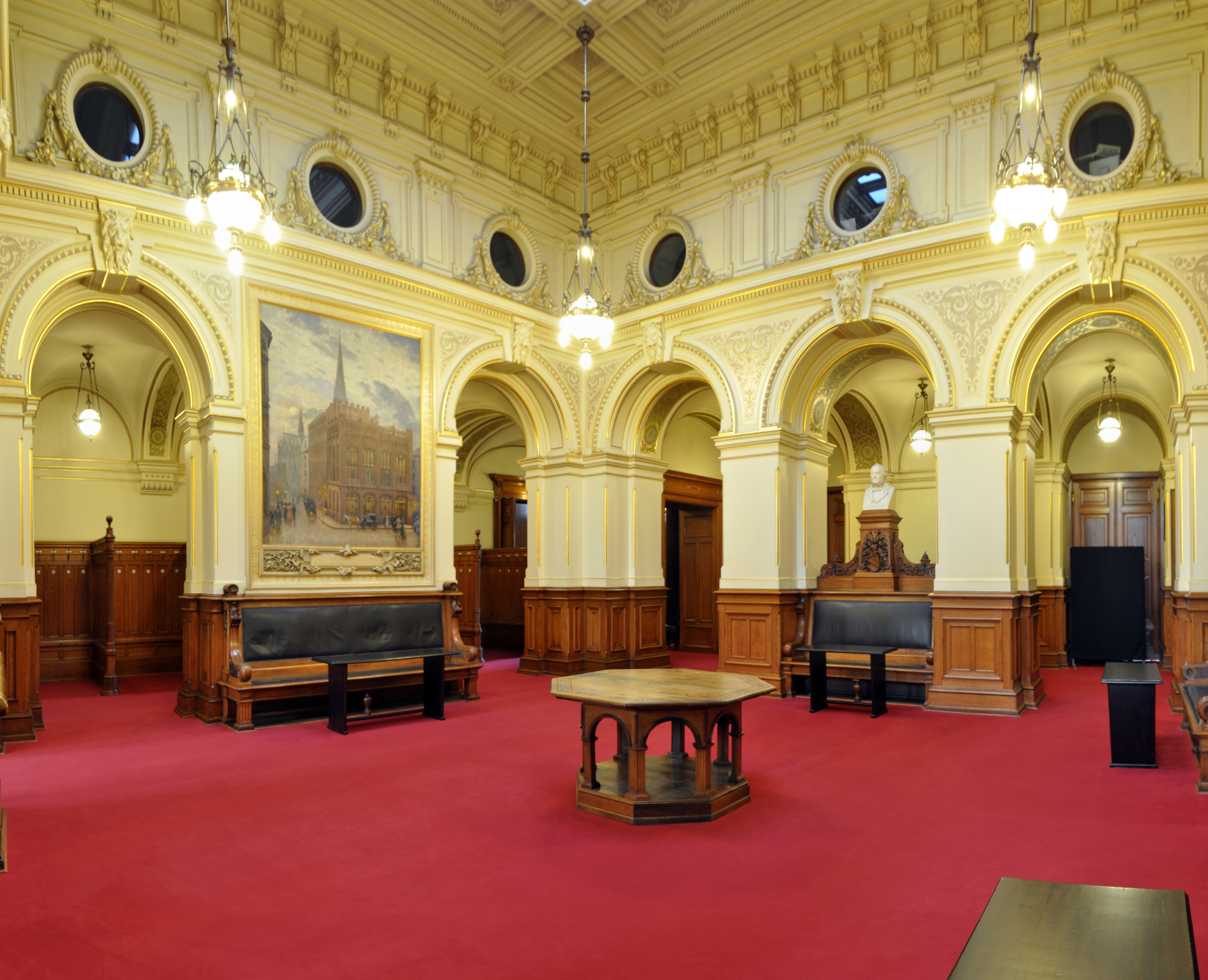 WikiProjekt Hamburgische Bürgerschaft 22./23. 6. 2011 Fotos aus dem Rathaus. Blick in den Bürgersaal. This is a photograph of an architectural monument.